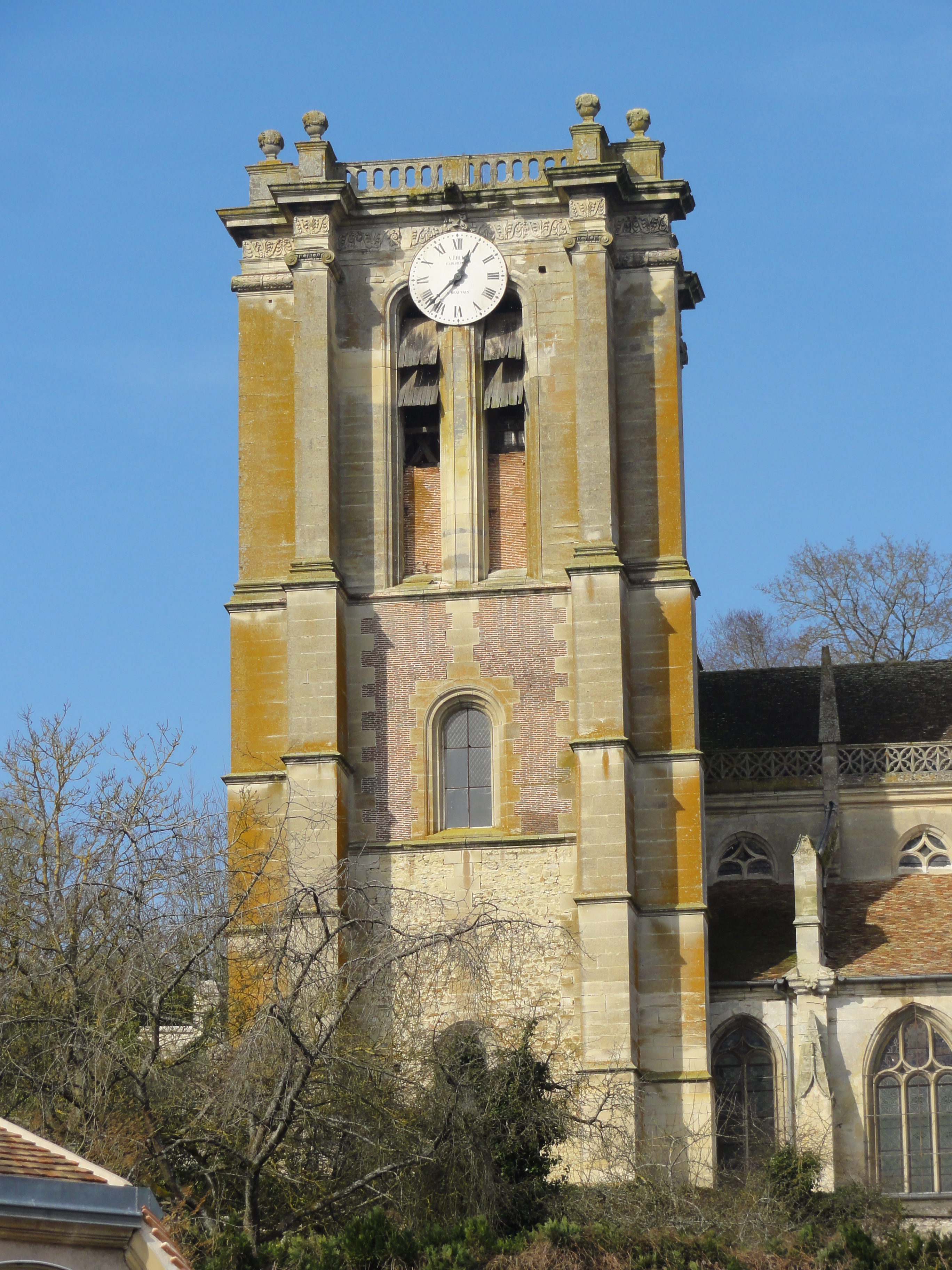 Église Saint-Jean-Baptiste de Chaumont-en-Vexin - voir titre.